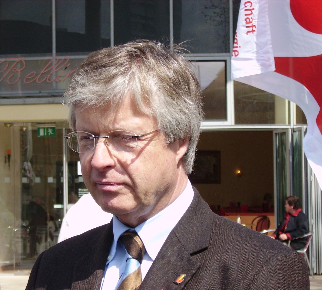 Hubertus Schmoldt, Vorsitzender der Gewerkschaft IG Bergbau, Chemie, Energie (IG BCE), bei einer Kundgebung zum Tag der Arbeit (1. Mai) 2008